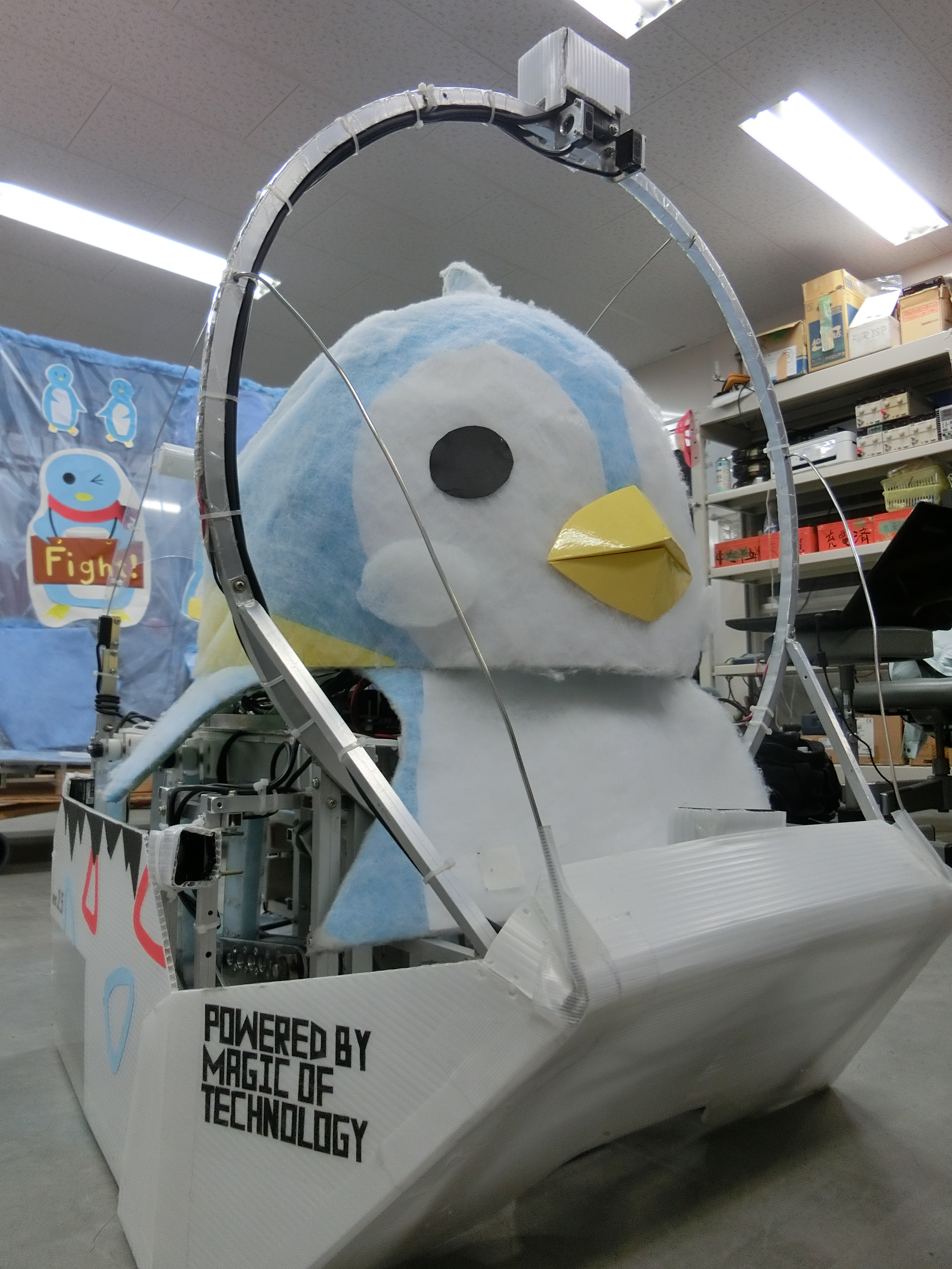 奈良高専の瞬殺ペンギンこと"じゃんぺん"。奥に映るのは縄回しロボット(通称:冷蔵庫)